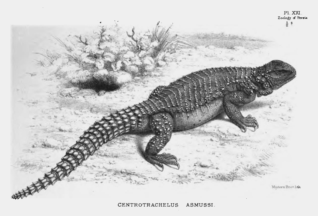 Uromastyx asmussi, Iranian Uromastyx